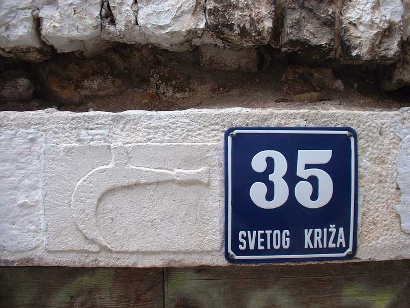 Kosir na nadvratniku, Dolac u Šibeniku